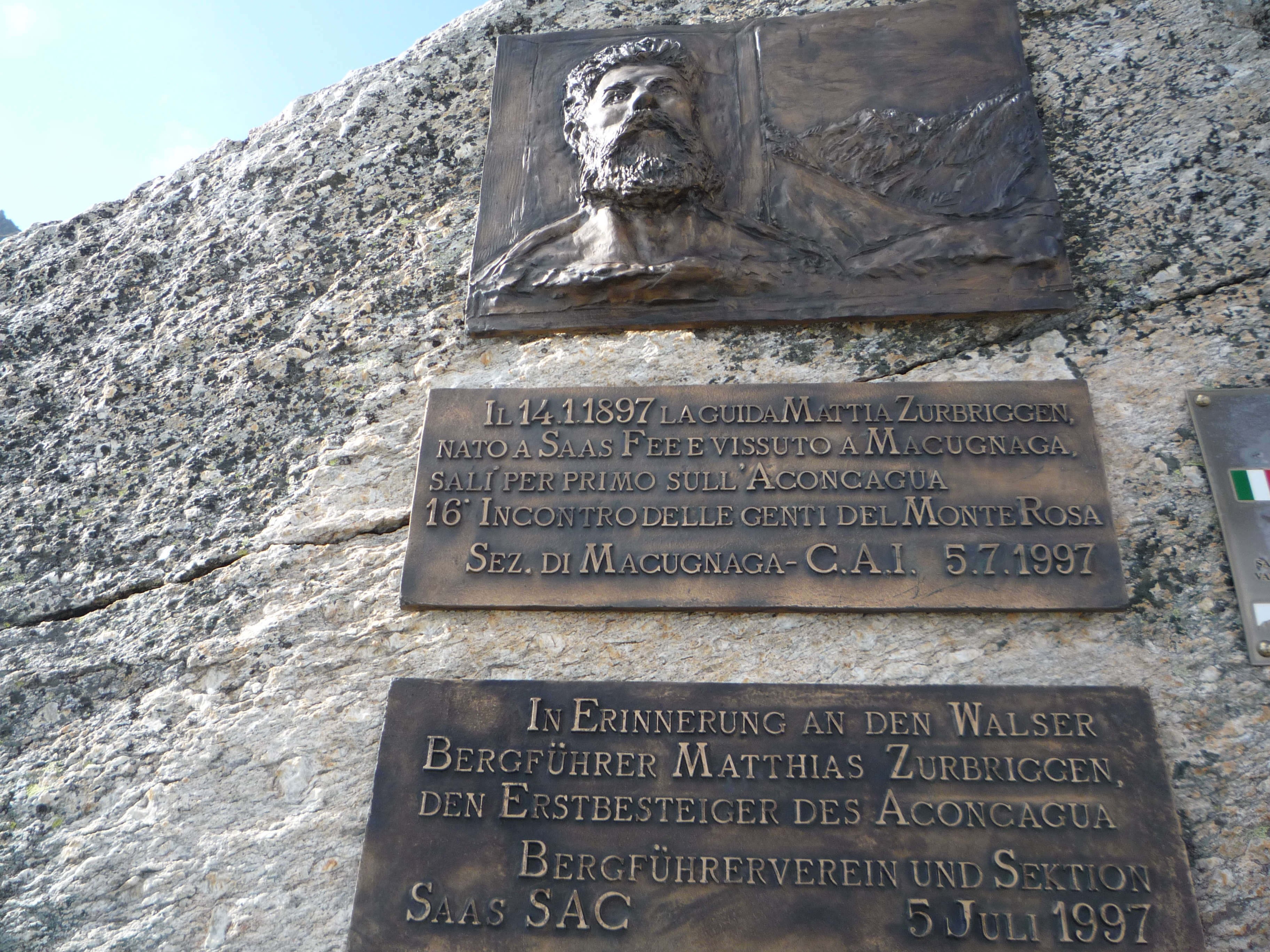 Ces plaques commémoratives se trouvent au col du Monte Moro, entre la Suisse et l'Italie, à proximité de la statue dorée, pour son ascension de l'Aconcagua